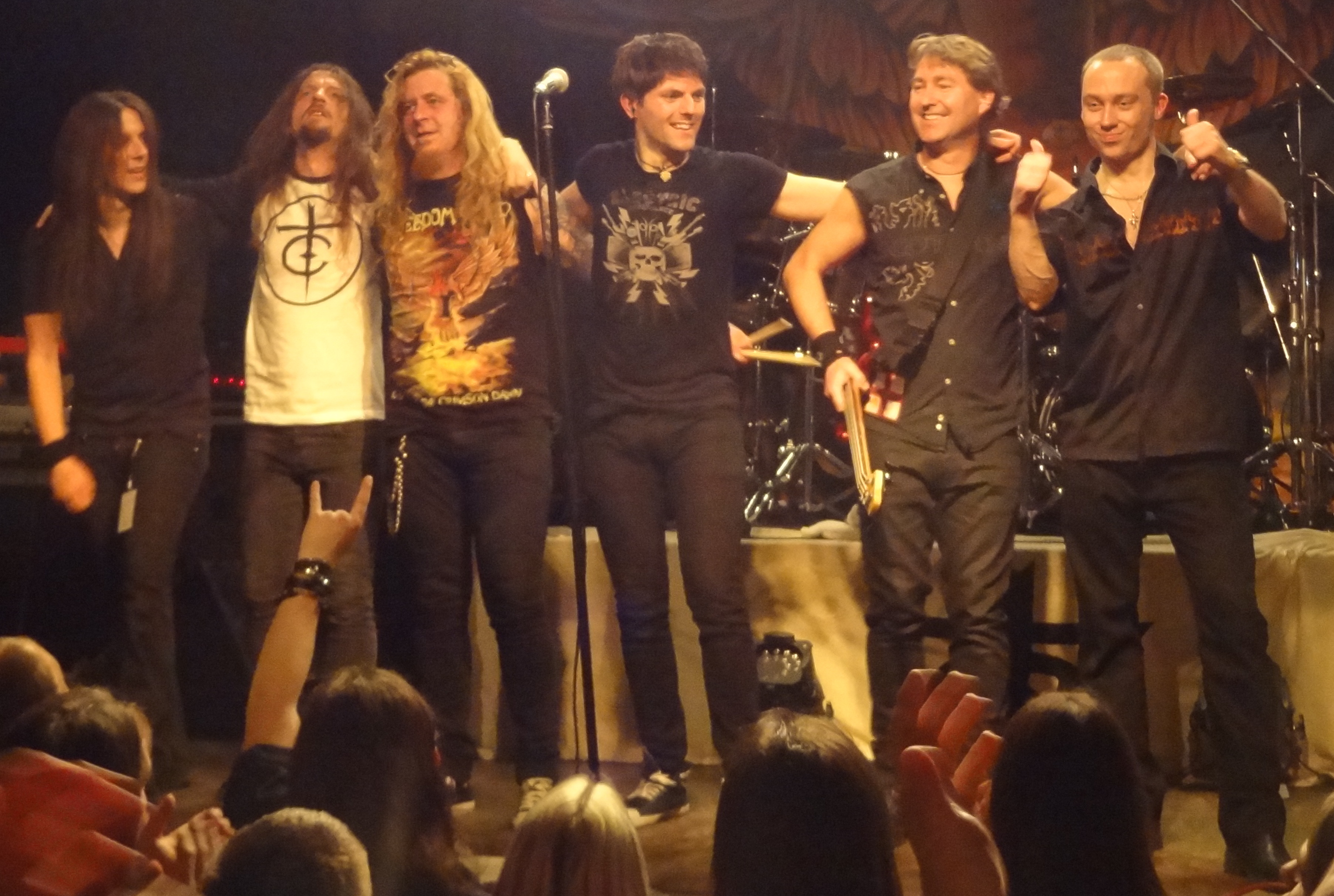 Power Quest am 11.03.2012 in der Zeche Bochum.